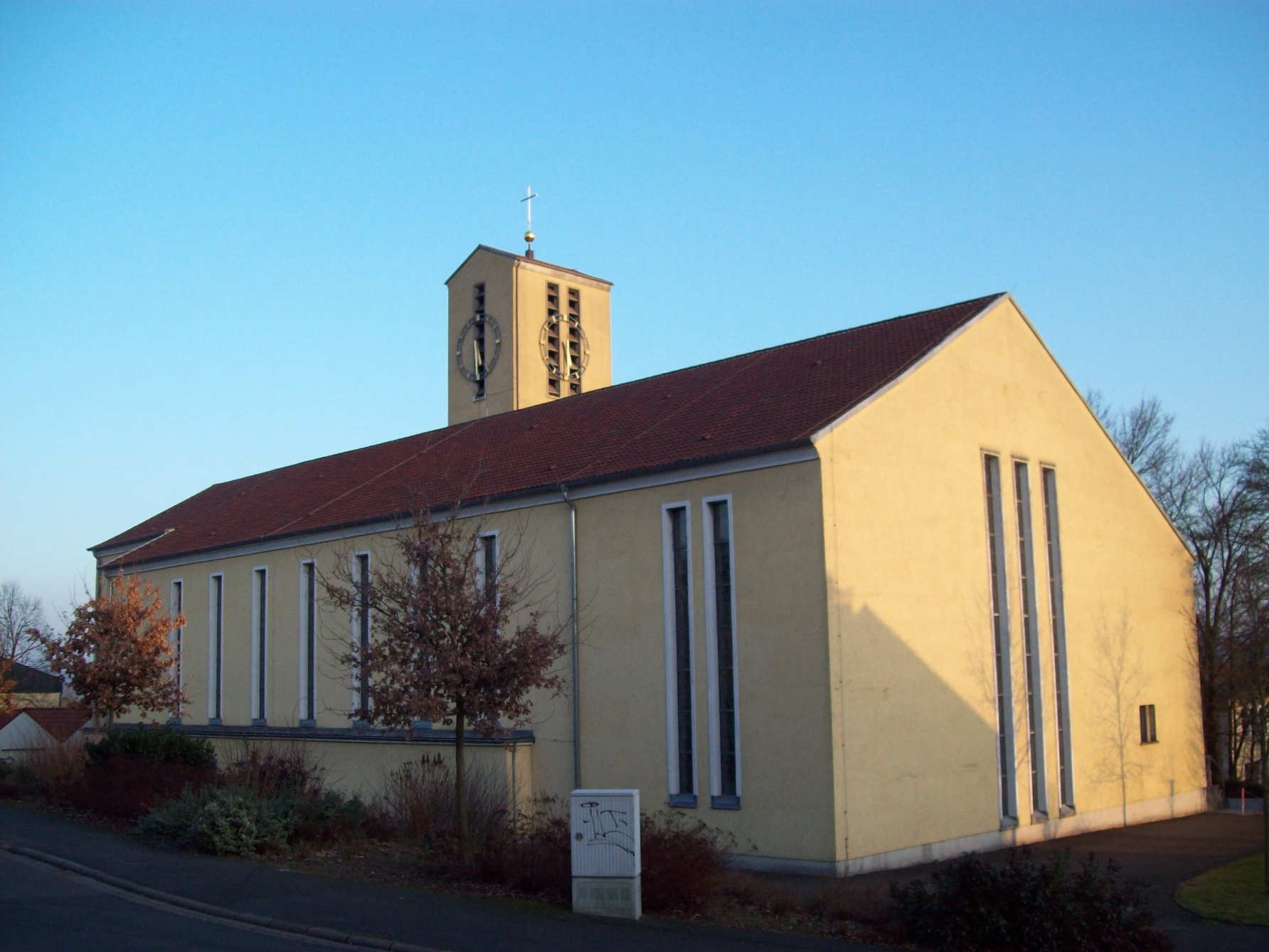 Katholische Pfarrkirche St. Konrad Aschaffenburg - Strietwald (Ansicht von Norden)